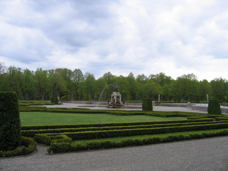 Drottningholm Palace Park1,Stockholm, Sweden